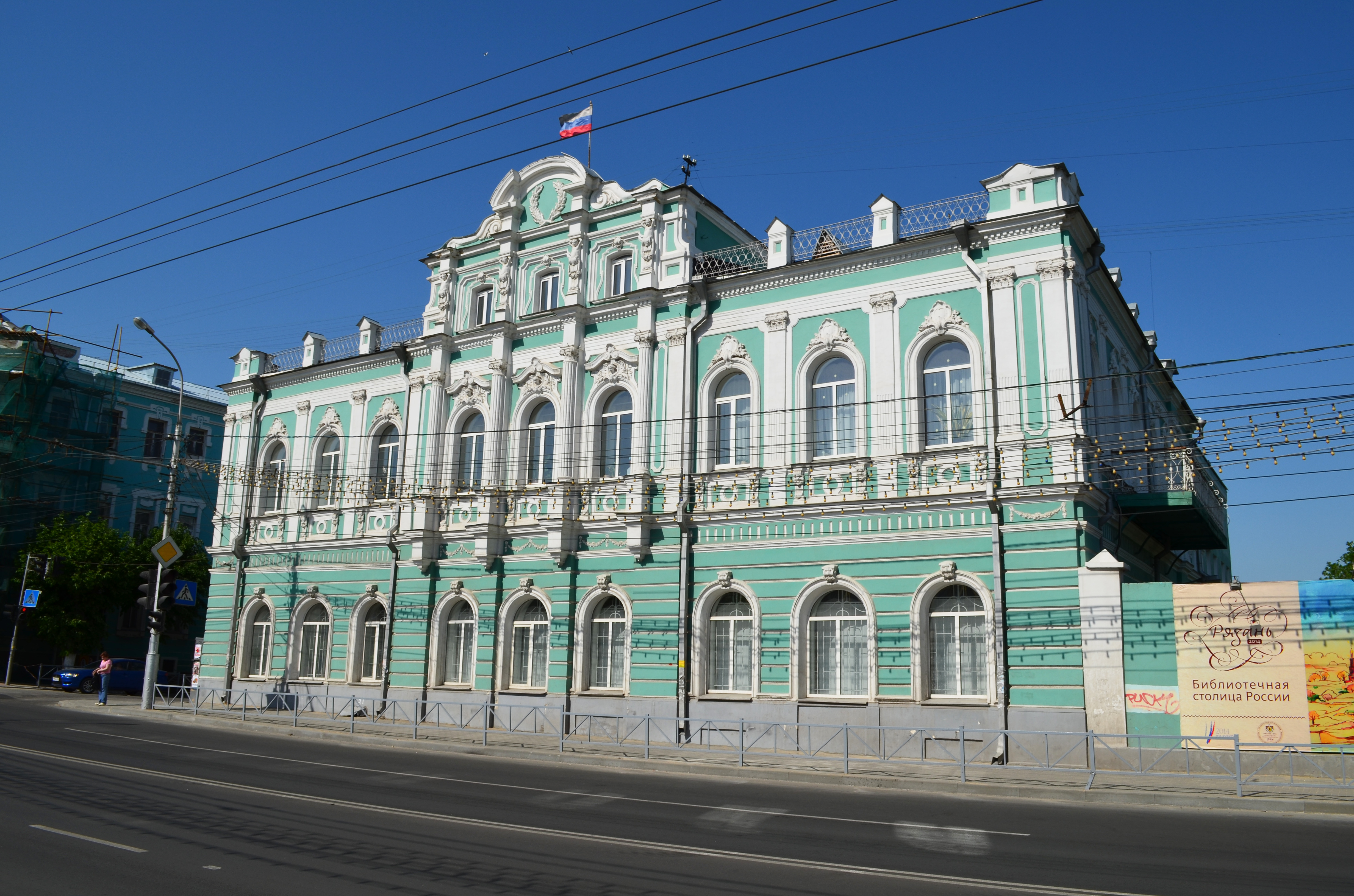 Рязань,ул.Ленина(Астраханская),д.44.